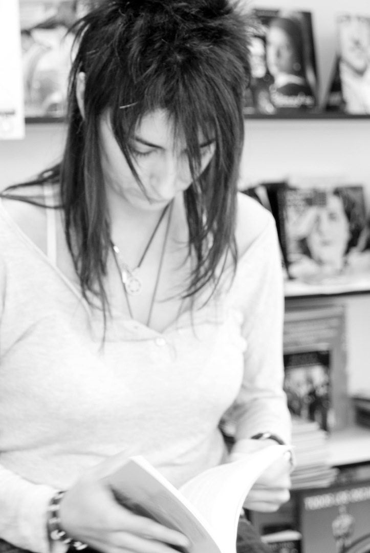 La escritora Mado Martínez firmando libros en la Feria del Libro de Madrid (2010)